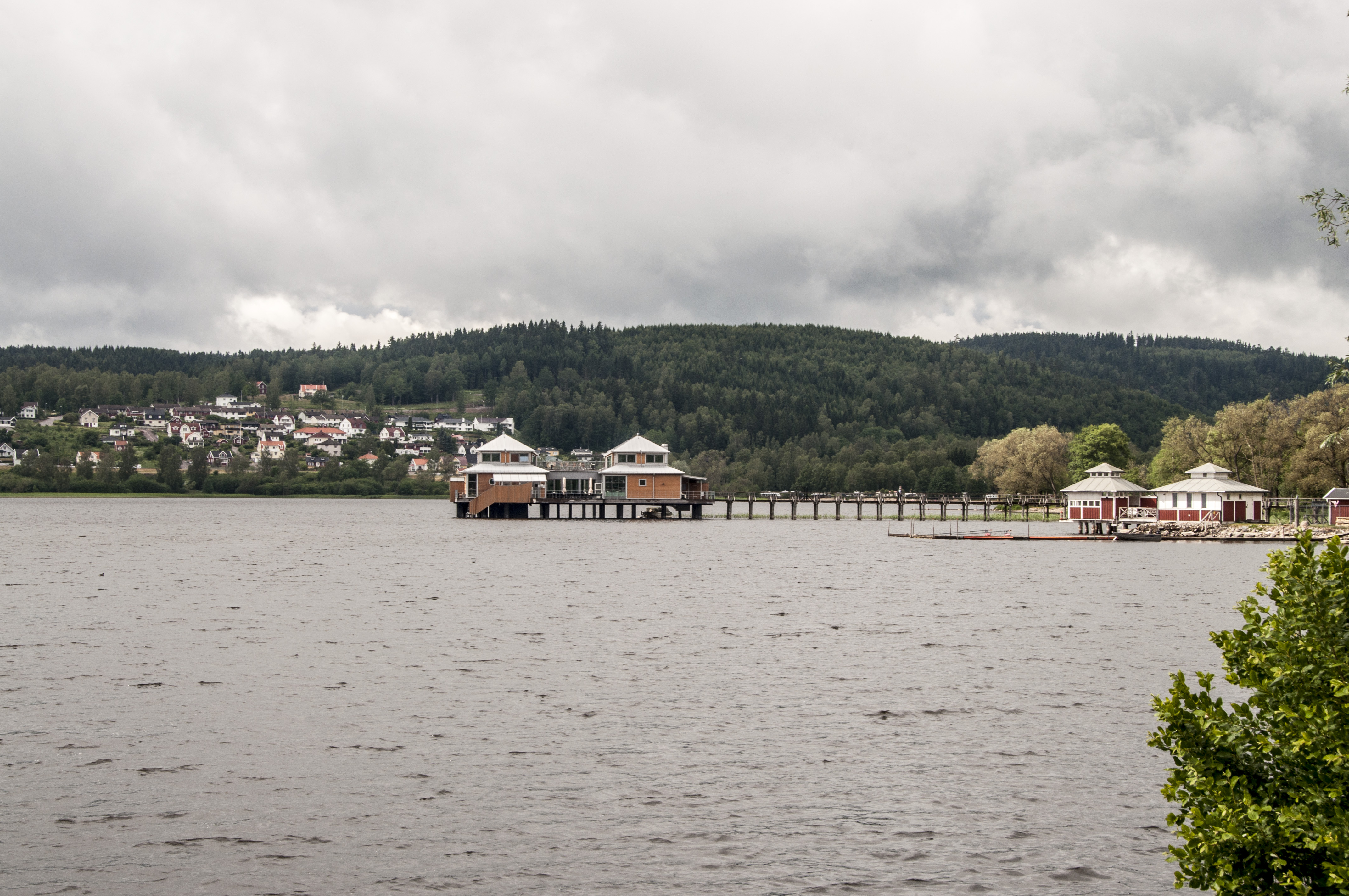 Ulricehamns Kallbadhus i Åsunden. Invigt 2008